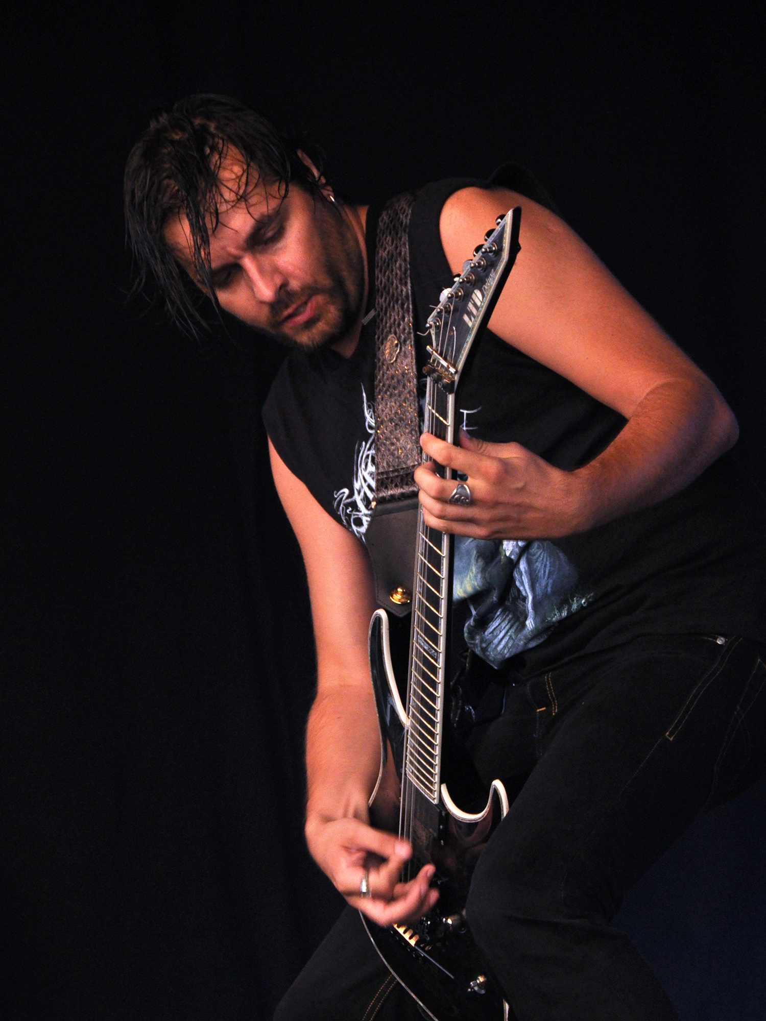 Keep of Kalessin au Metal Mean Festival, le 20 08 2011, à Méan (Bel).